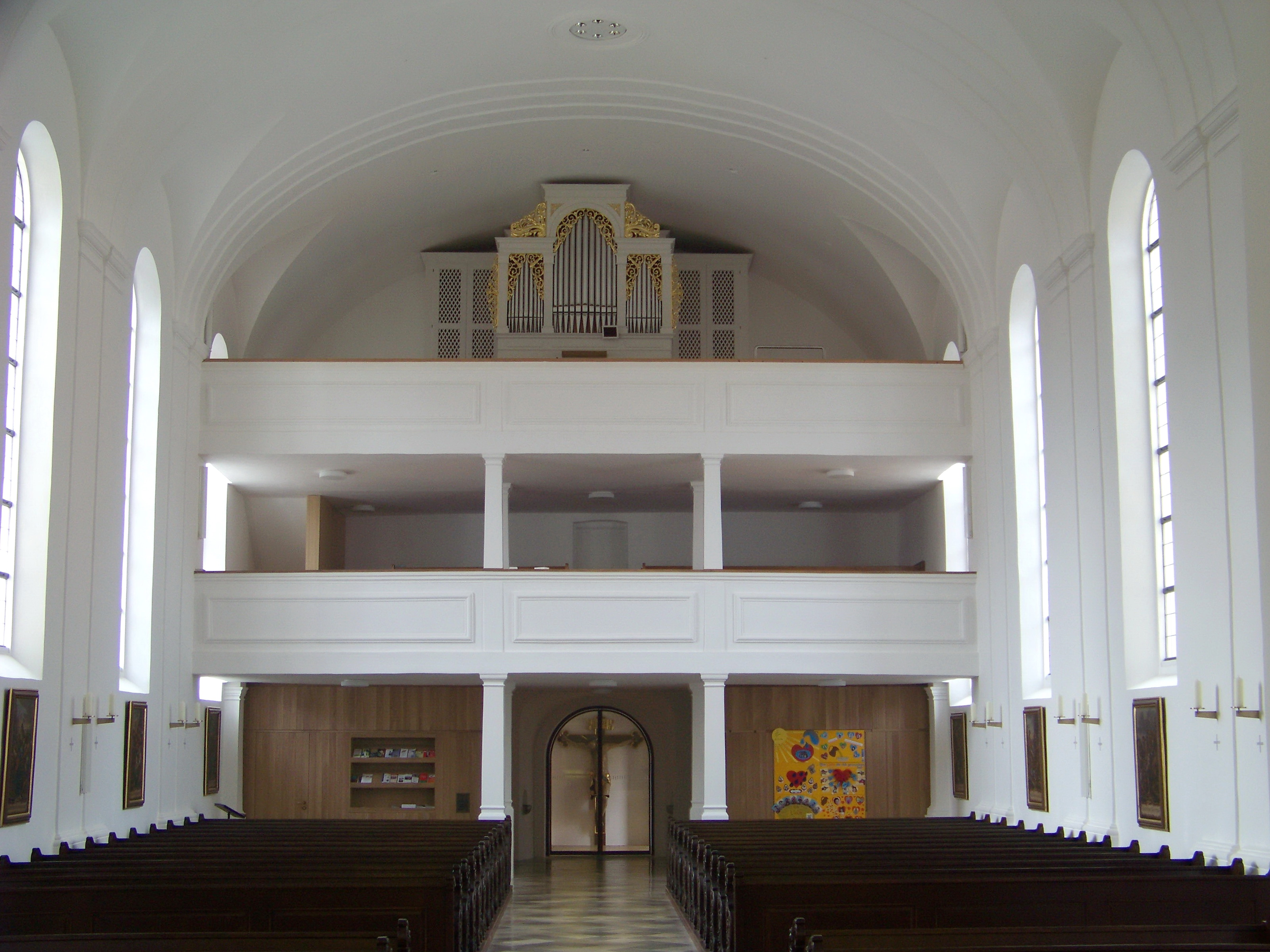 Ergoldsbach, Hauptstraße 18. Katholische Pfarrkirche St. Peter und Paul. Saalkirche mit erweitertem Querhaus. Kirchenschiff mit Tonnengewölbe und doppelgeschossiger Westempore. Beichtzimmer unter der Emopre. Durch die gläserne Eingangstüre ist das Kruzifix in der Eingangshalle zu sehen. Aufnahme nach der Renovierung 2015-2016.